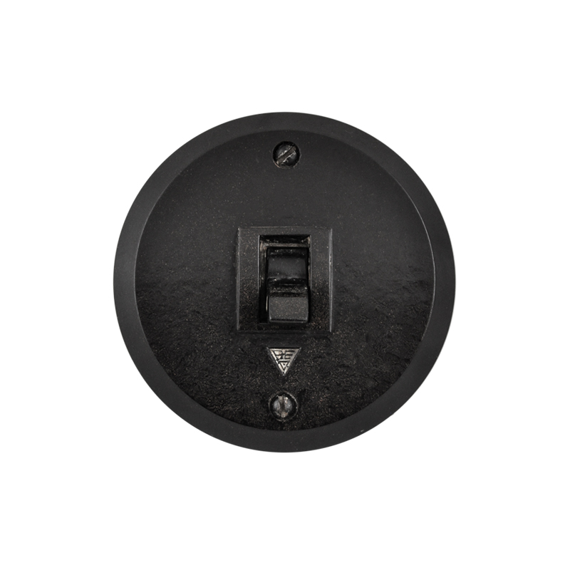 Łącznik hebelkowy, 1935 rok. Ówczesna nazwa producenta: Spółka Akcyjna Przemysłu Elektrotechnicznego "Czechowice".